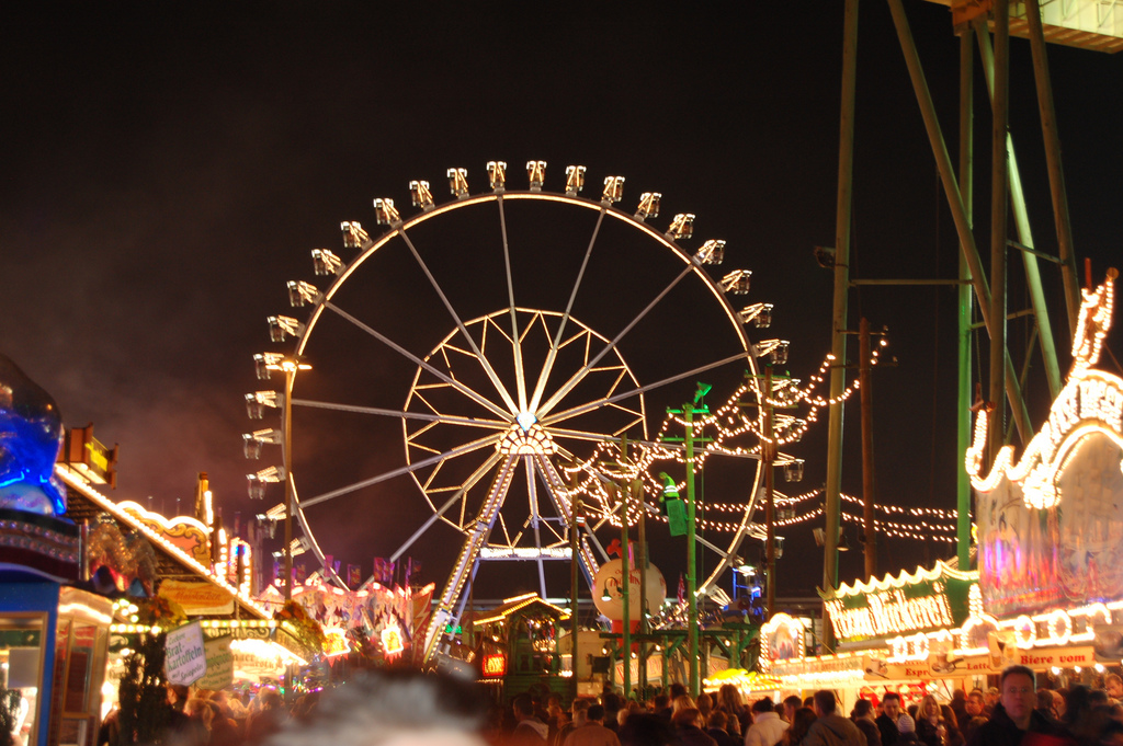 Bremer Freimarkt im Jahr 2008, Blick auf Riesenrad und Budengasse bei Nacht.